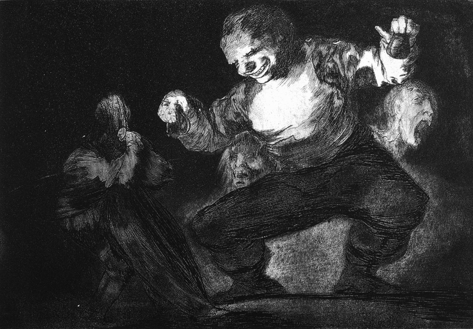 Disparate nº 4. Bobalicón.